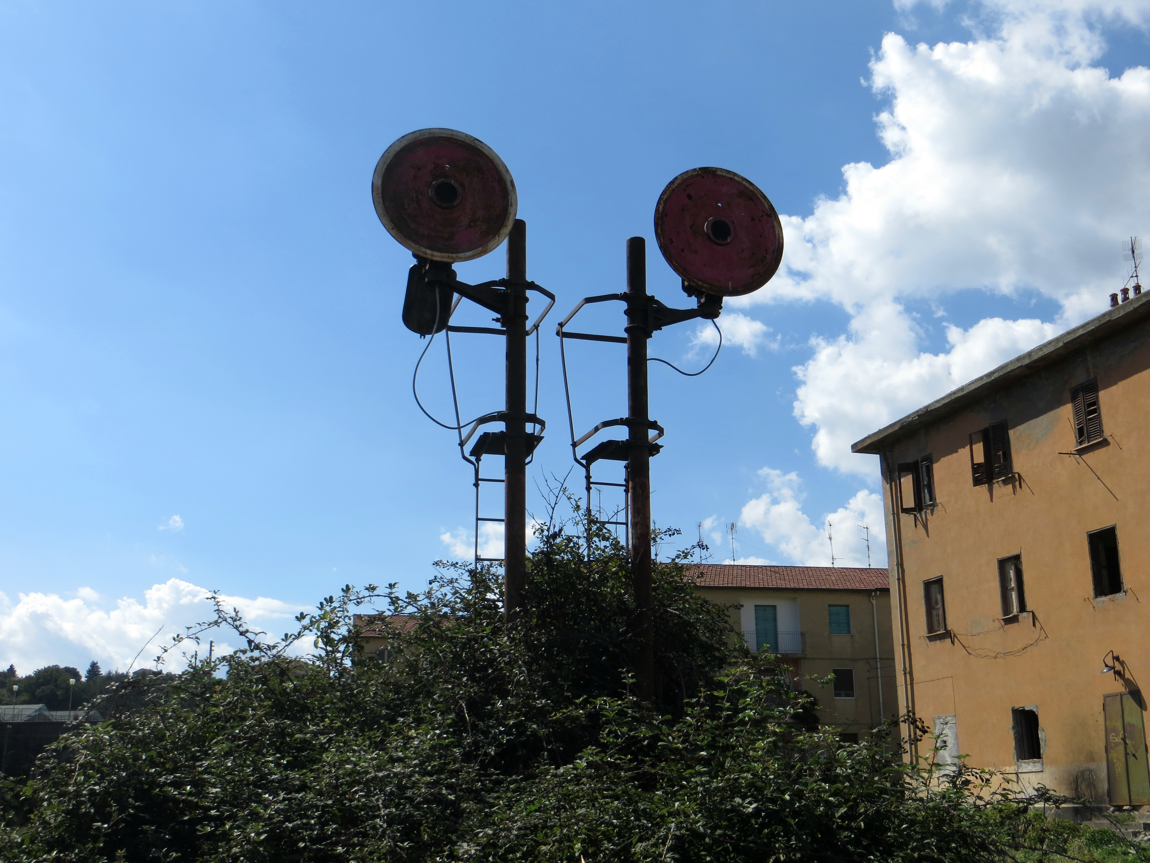 Segnali avviso di fine tratta. Stazione FS di Randazzo.